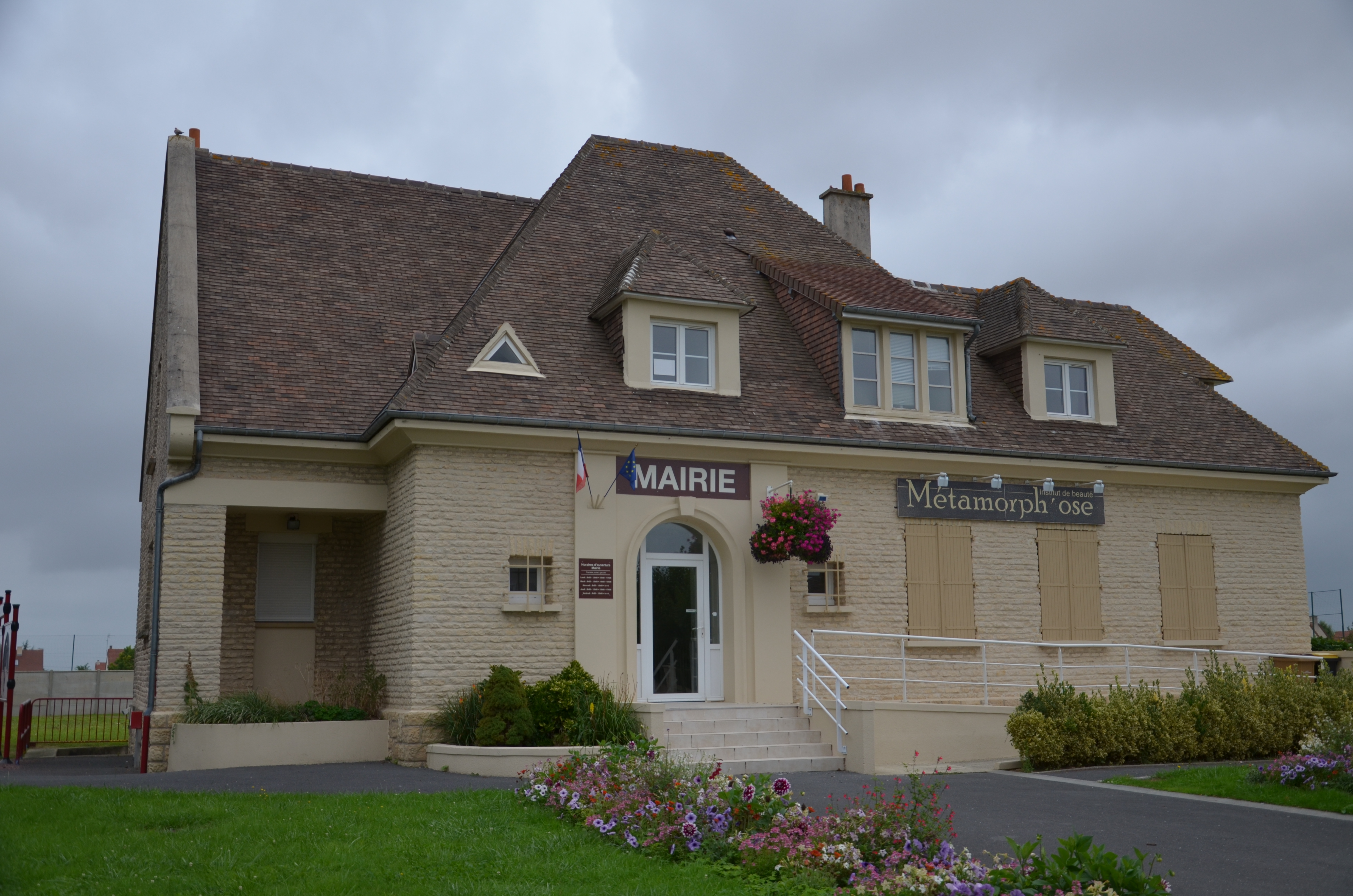 Mairie de Bourguébus.